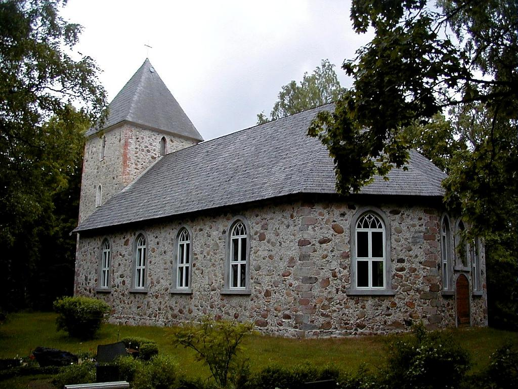 Ģipkas baznīca 2002-06-24